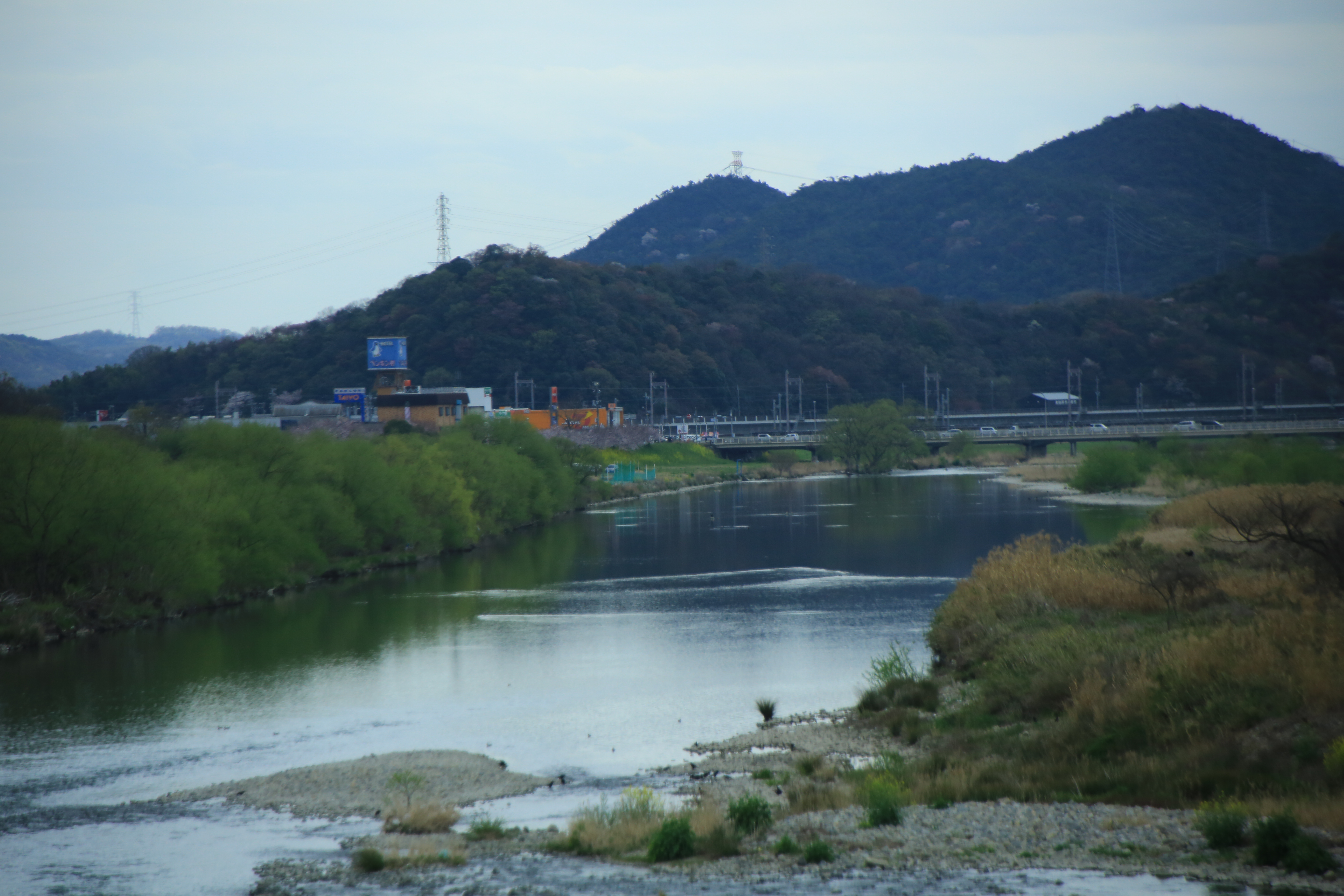 20160403_Miyazu-Himeji_3160